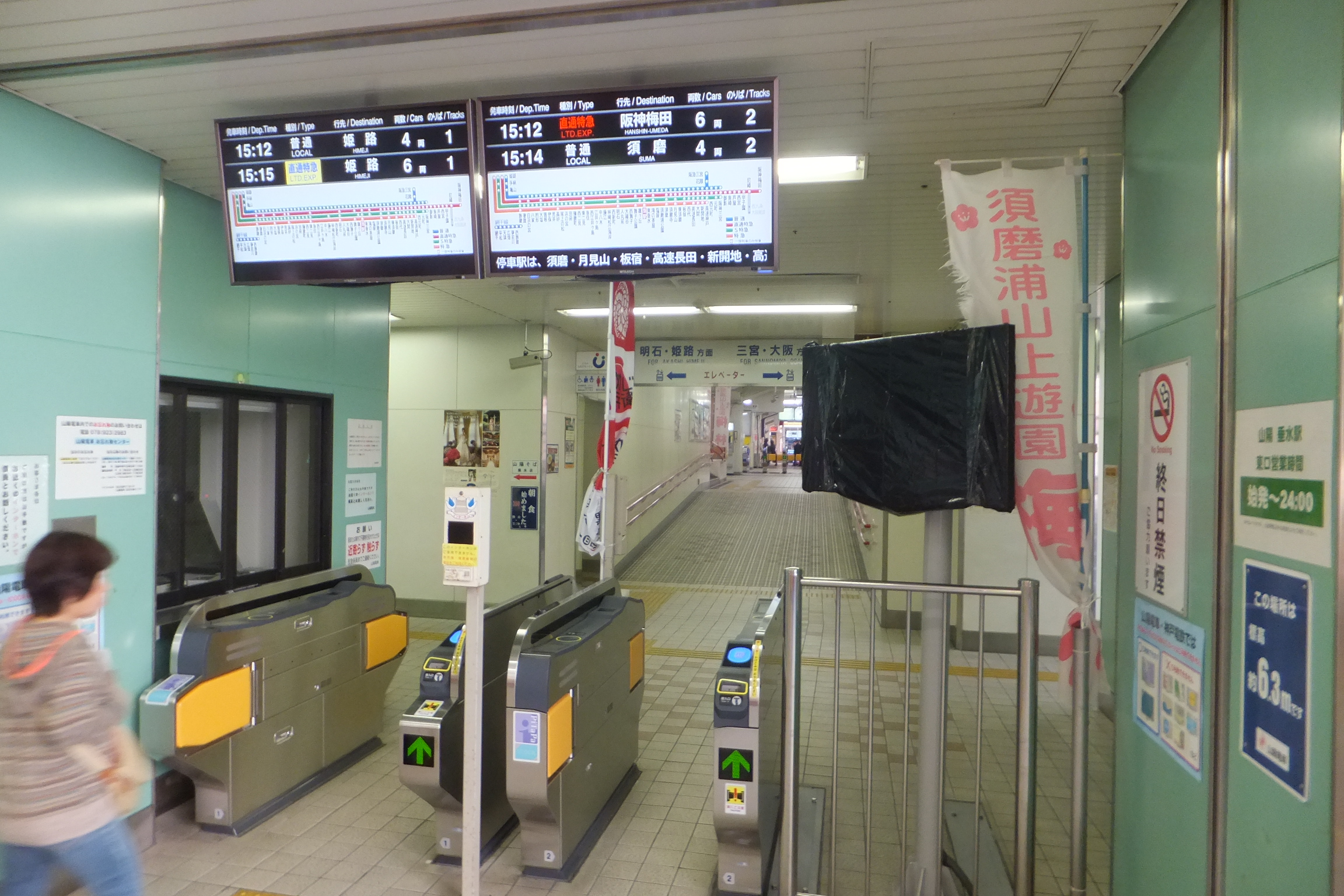 山陽垂水駅